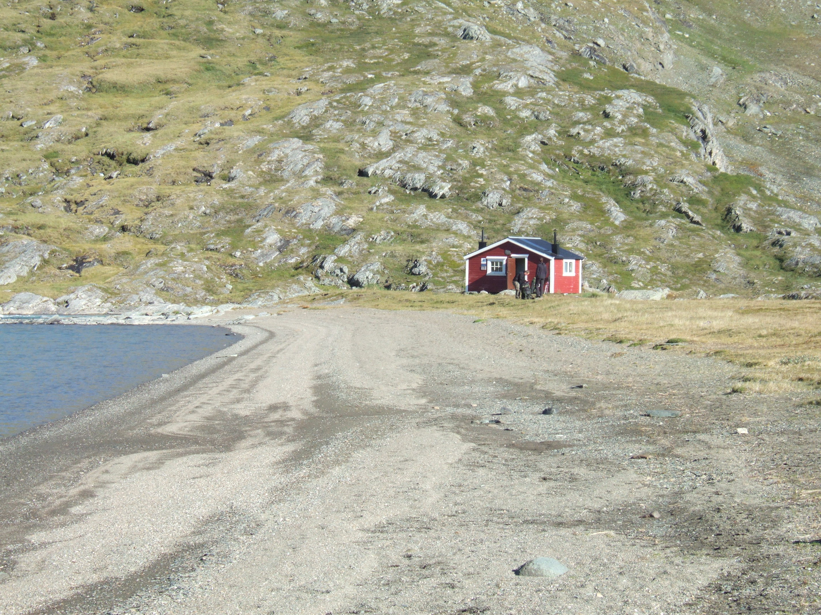 Konsul Nils Perssons stuga (Sårjåsjaure fjällstuga) vid Sårjåsjávrre, Sverige.